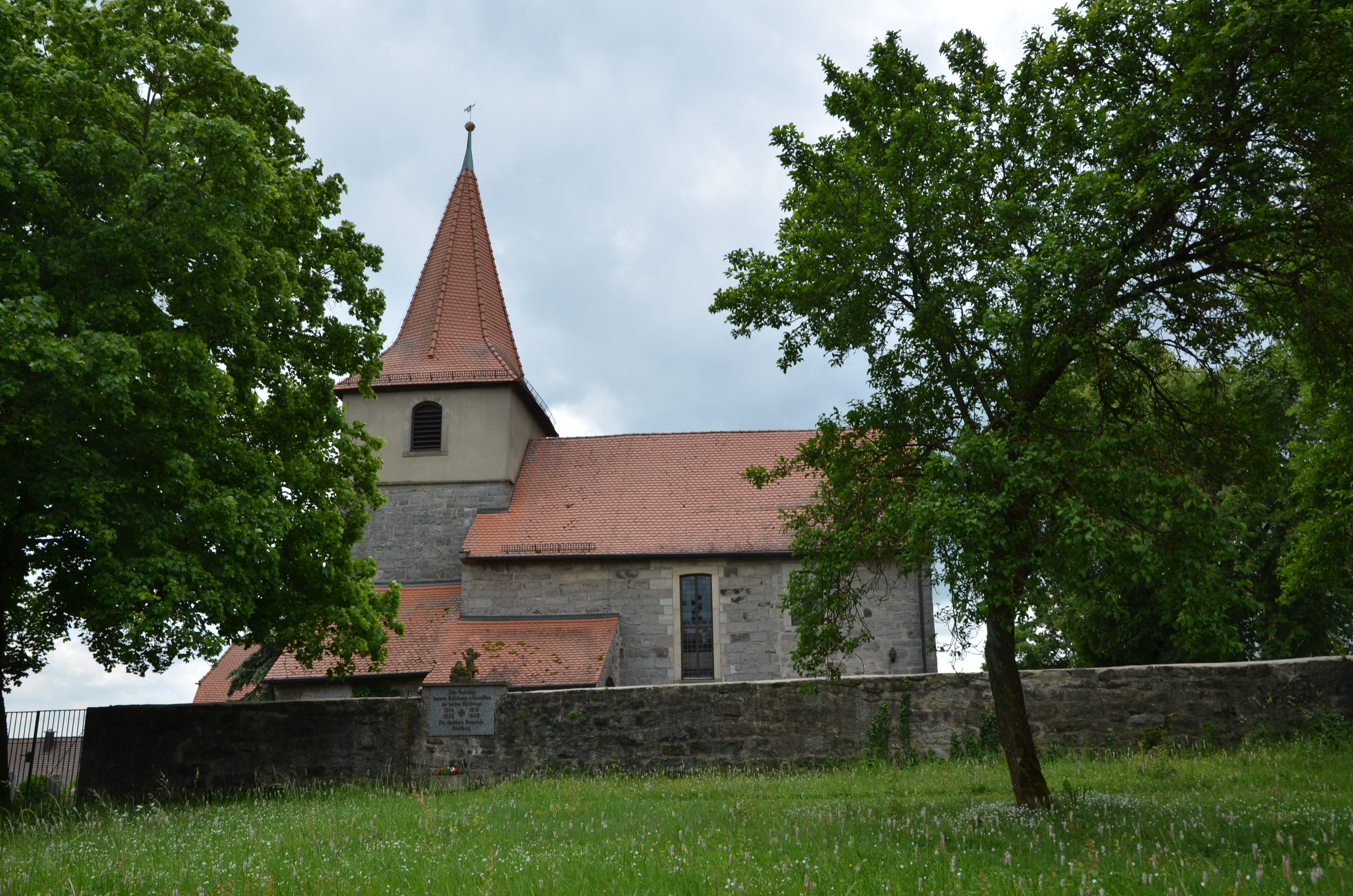 evang.-luth. Kirche St. Nikolaus in Stettberg